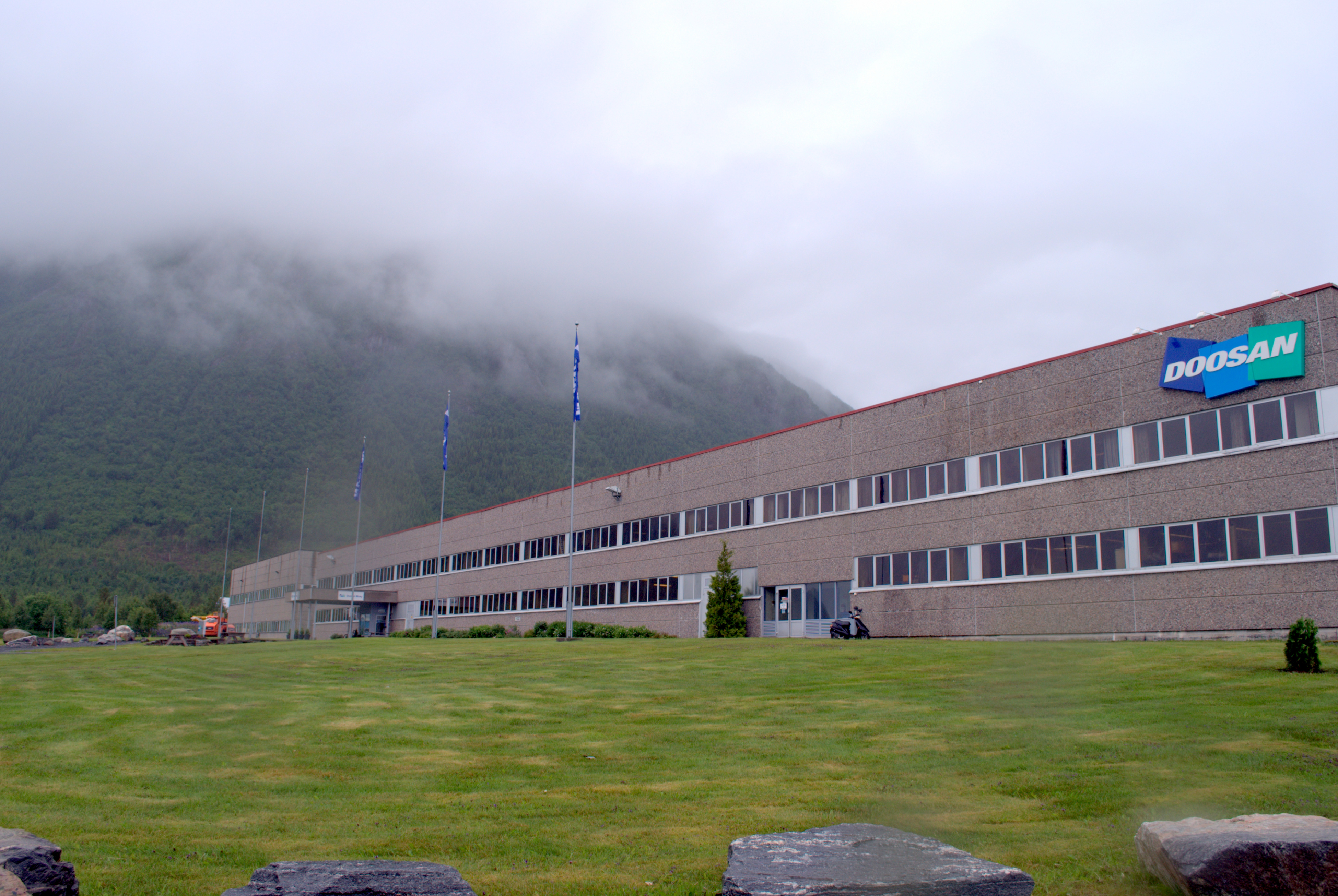 Moxy Doosan i Elnesvågen, Fræna i Møre og Romsdal.